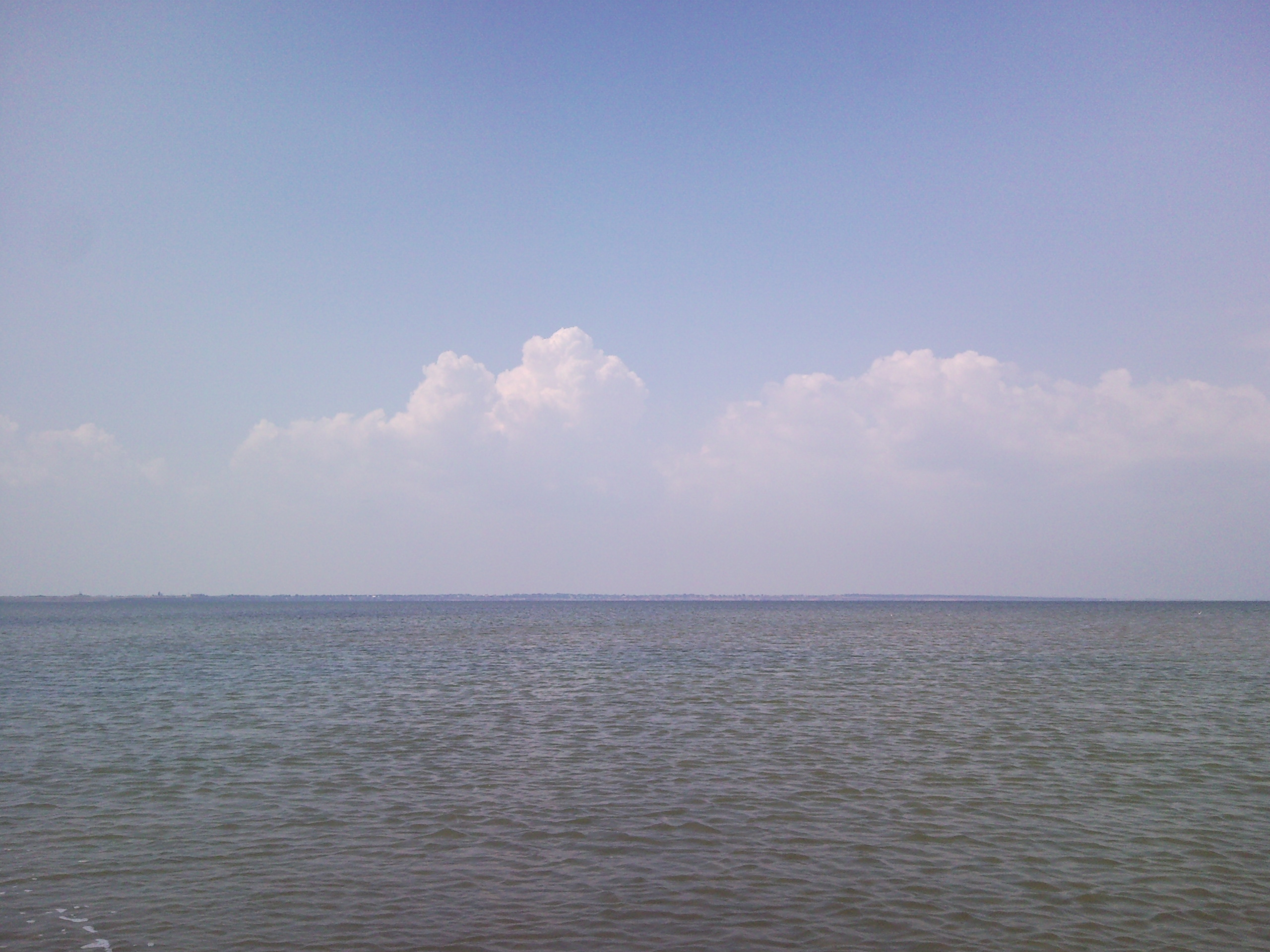 Озеро Бурнас Вигляд на село Тузли